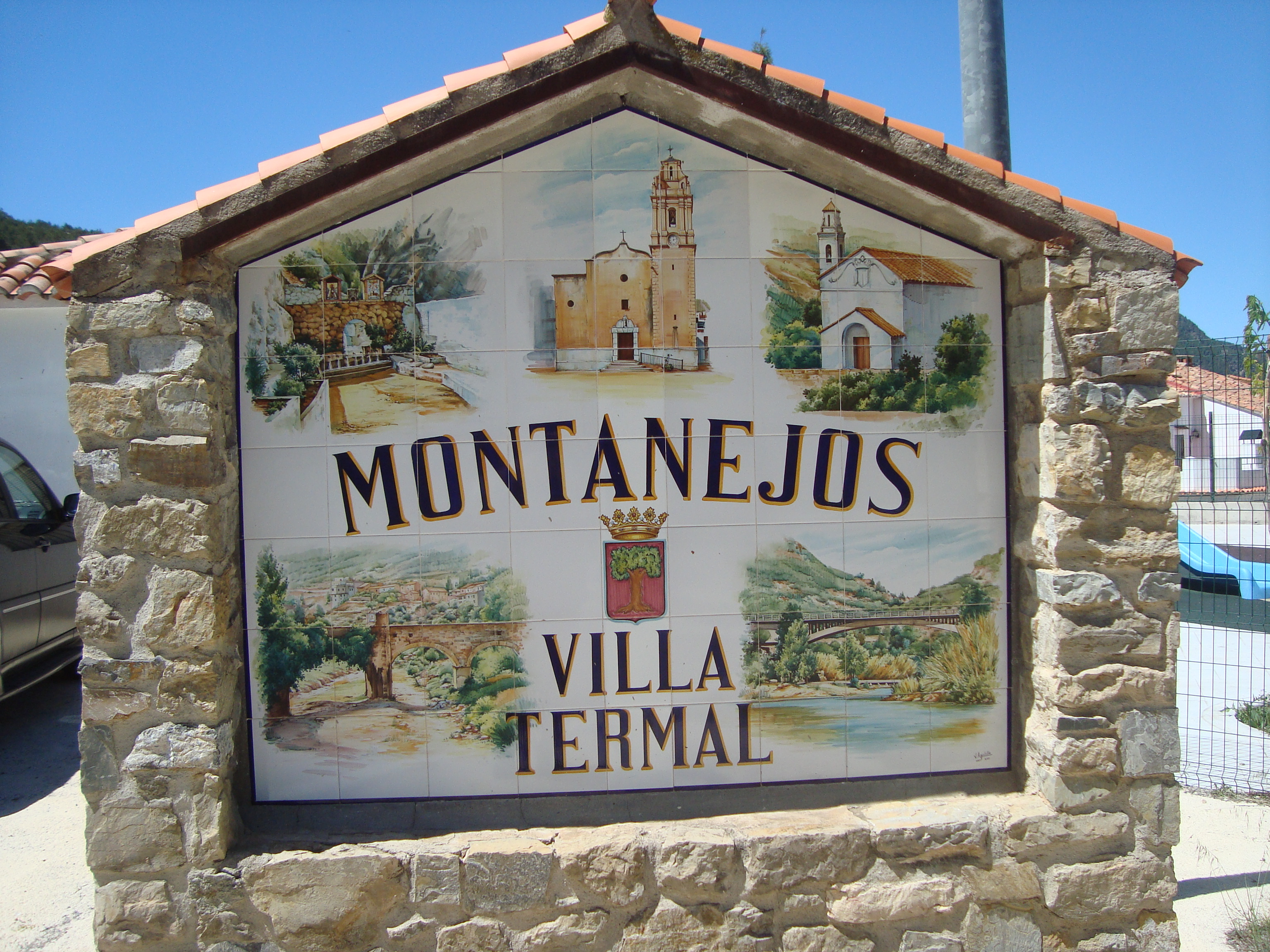 Montanejos, Villa Termal (Comarca Alto Mijares, Castellón)